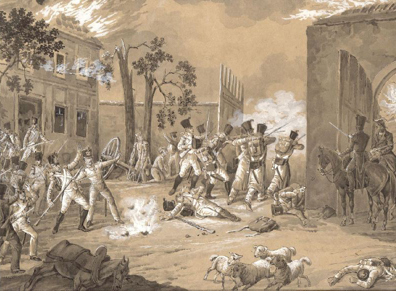 Erstürmung der Schäferei Auenhayn bei Leipzig (Zeichnung von Ernst Wilhelm Straßberger)